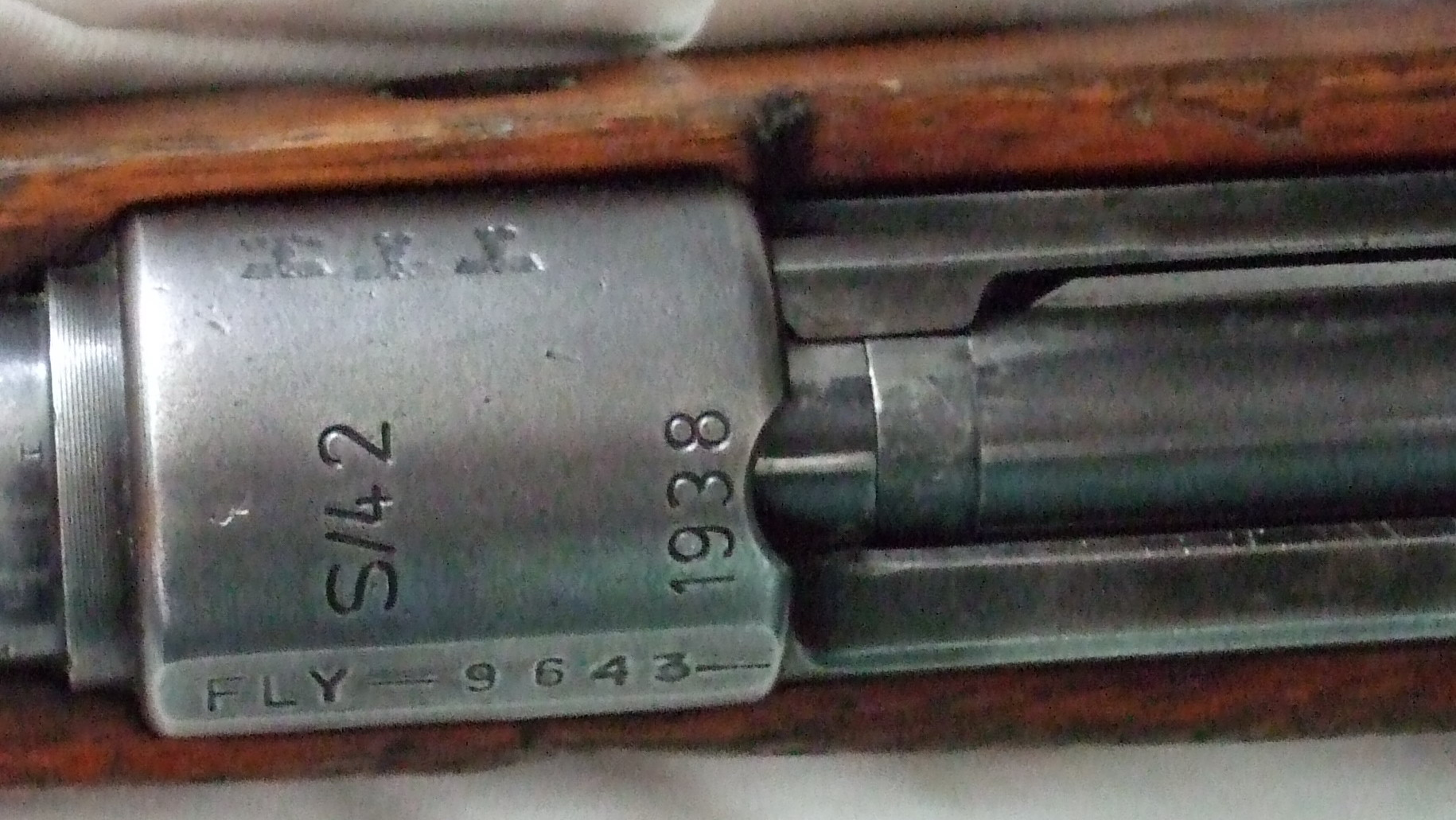 S-Code auf einem K98 k